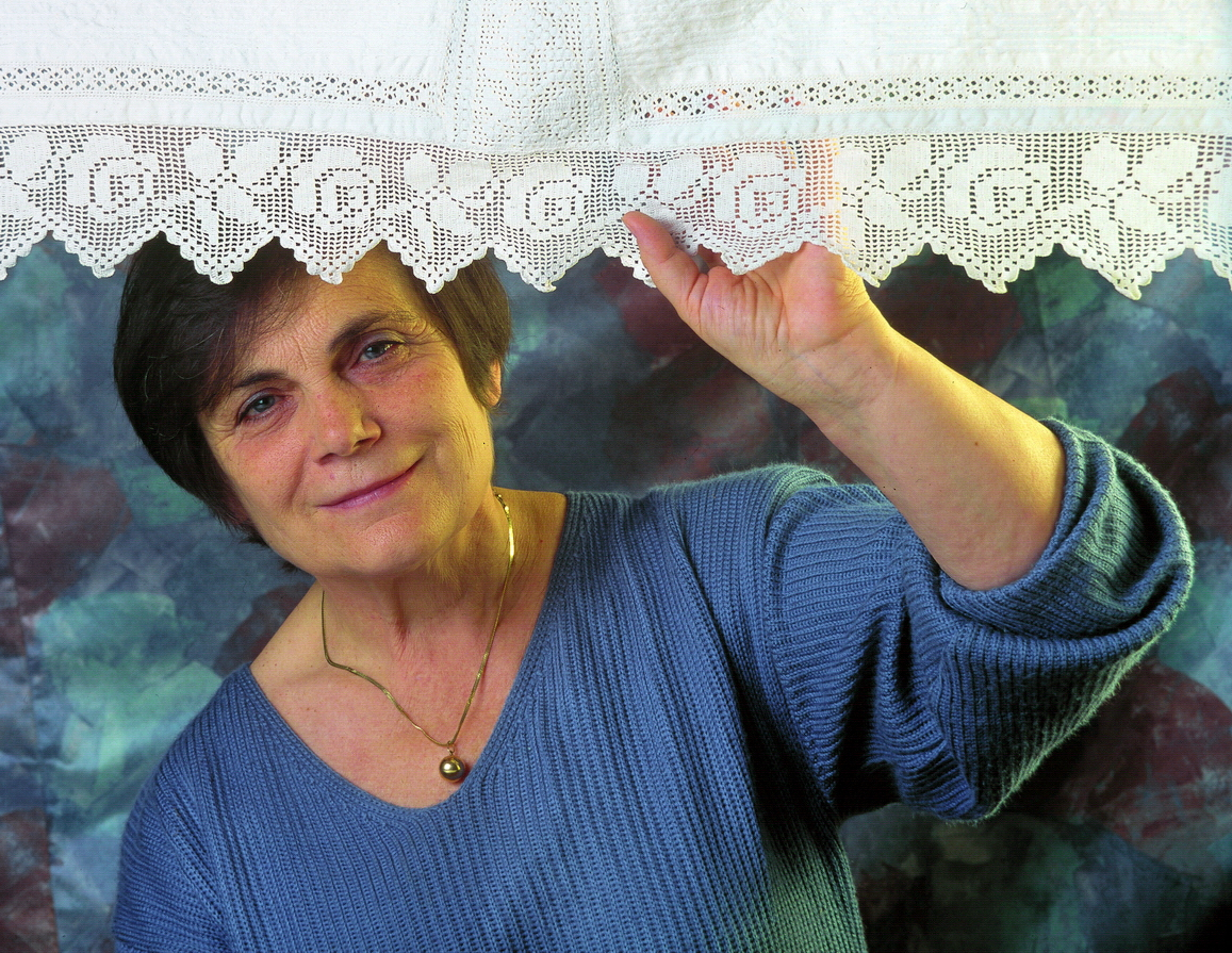 Tari Márta portré